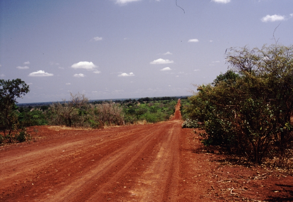 Die Northbank zwischen Janjanbureh (Georgetown) und Barra, dies ist die einzige Ost – West Verbindung am Nordufer des Gambia River, andere „Straßen“ gibt es nicht. Bild in der Nähe von Janjanbureh aufgenommen